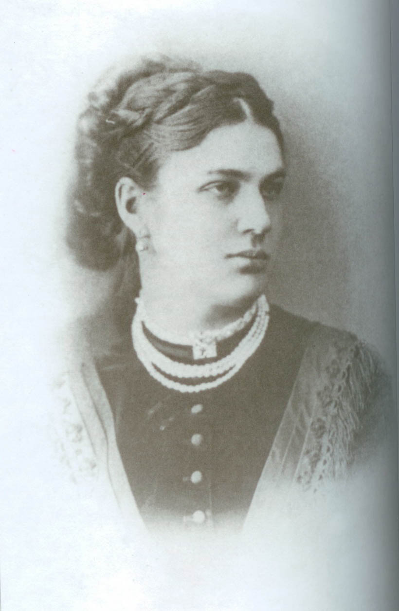 Софья Петровна Ланская, в замуж. Шипова (1846-1918) - дочь Н. Н. Гончаровой от 2-го брака.